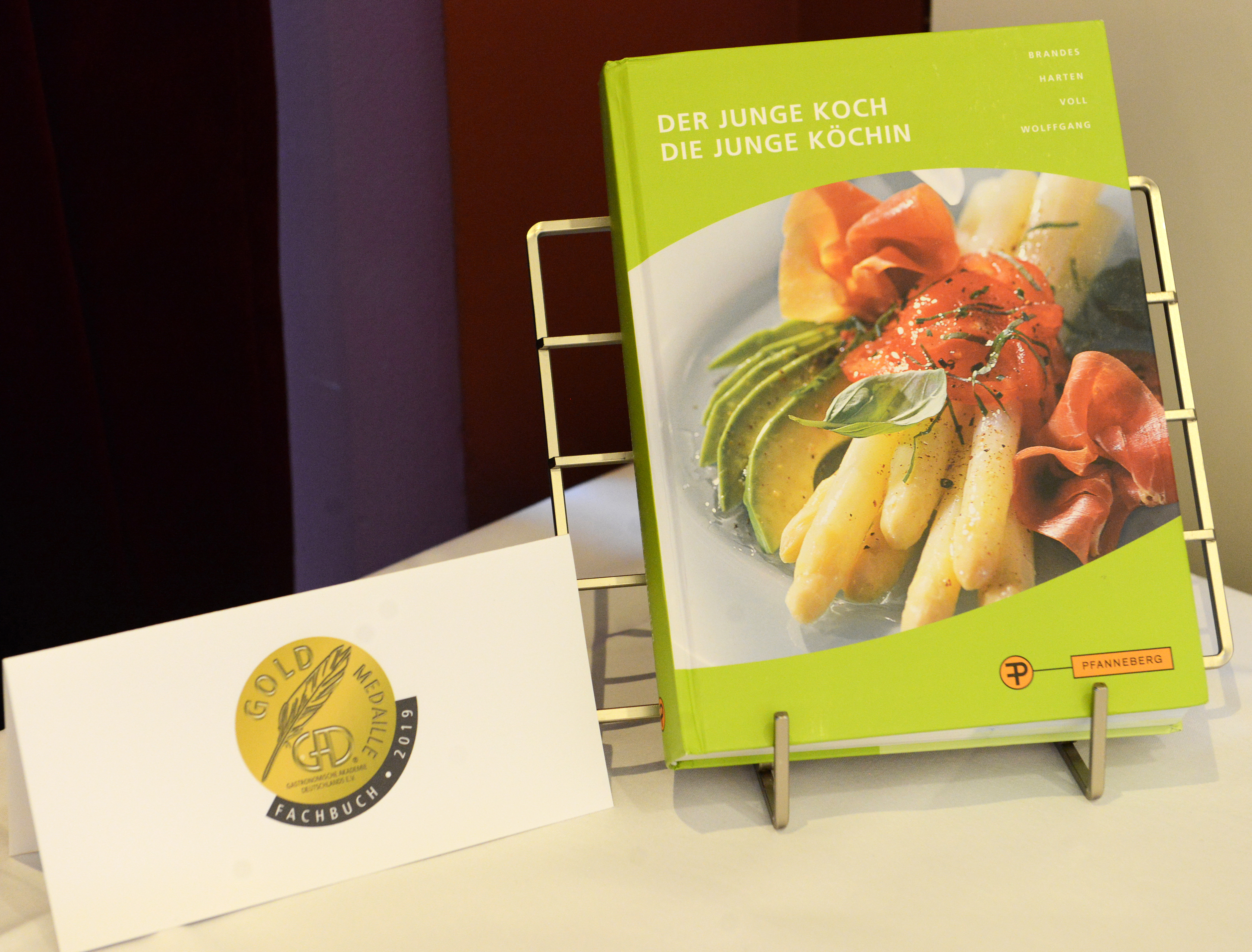 Beim Literarischen Wettbewerb 2019 der Gastronomischen Akademie Deutschlands (GAD) wurde Der Junge Koch mit einer Goldmedaillen als bestes Buch der Kategorie "Fachbuch" ausgezeichnet.